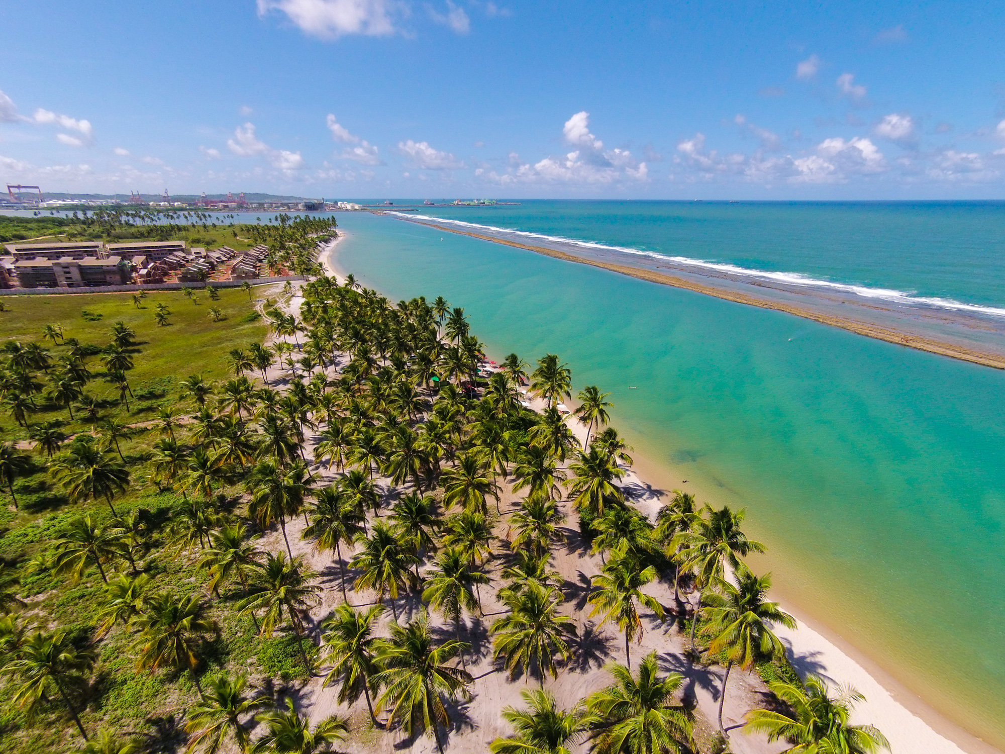 Praia de Muro Alto, em Pernambuco, perto de Porto de Galinhas. Foto feita por drone